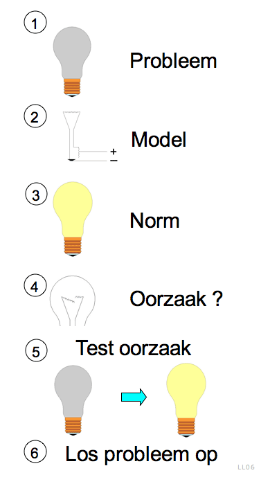 Probleemoplosmodel. Visualisatie van het probleem oplos proces. Juli 2006 Laurens van Lieshout.